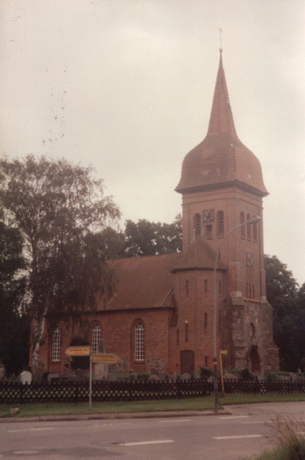 Die Kirche von Natendorf